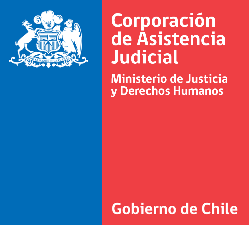 Logo Institucional de la Corporación de Asistencia Judicial.